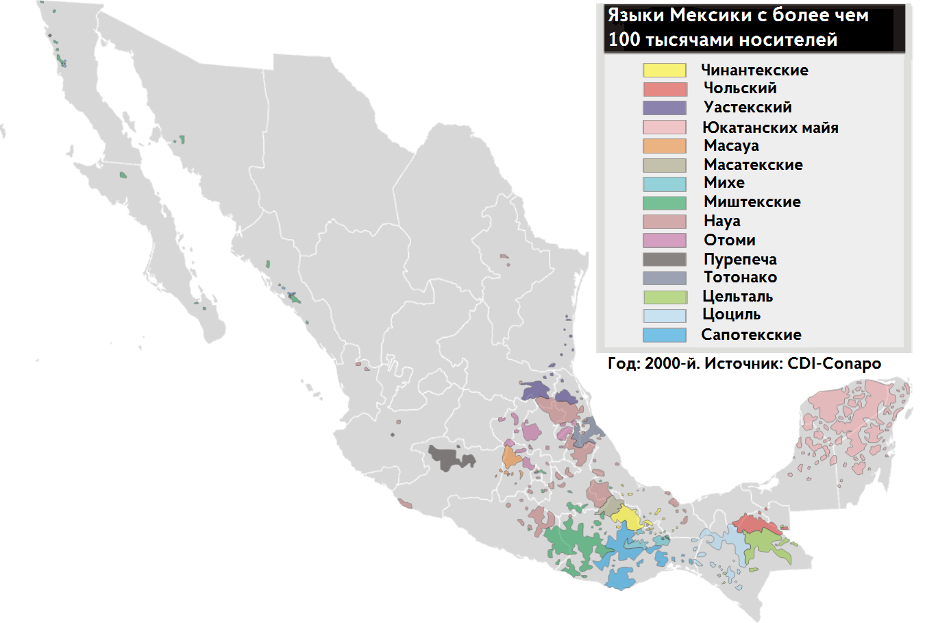 Производная работа от Mapa de lenguas de México + 100 000.png, авторства Yavidaxiu